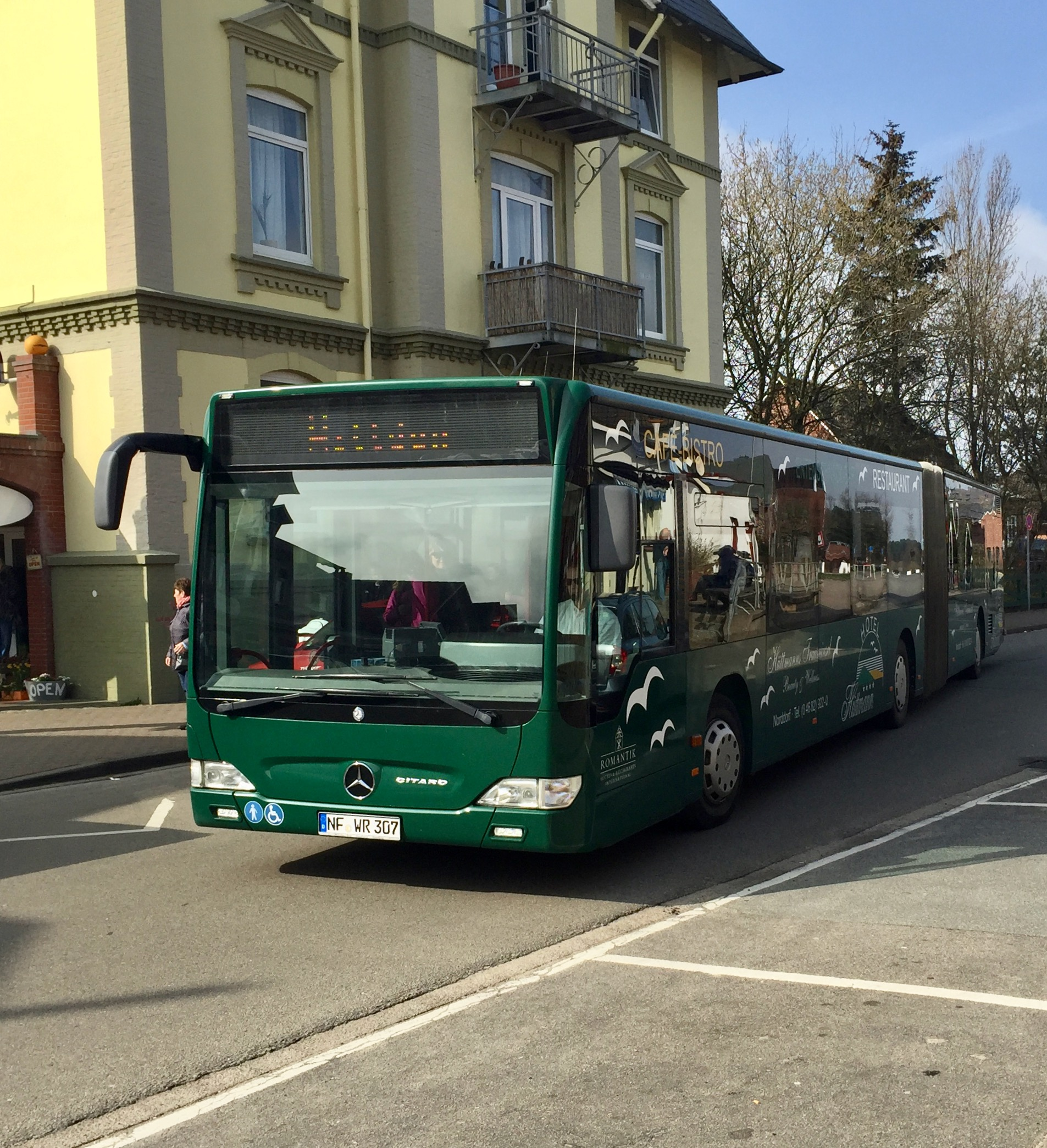 Ein Linienbus auf Amrum